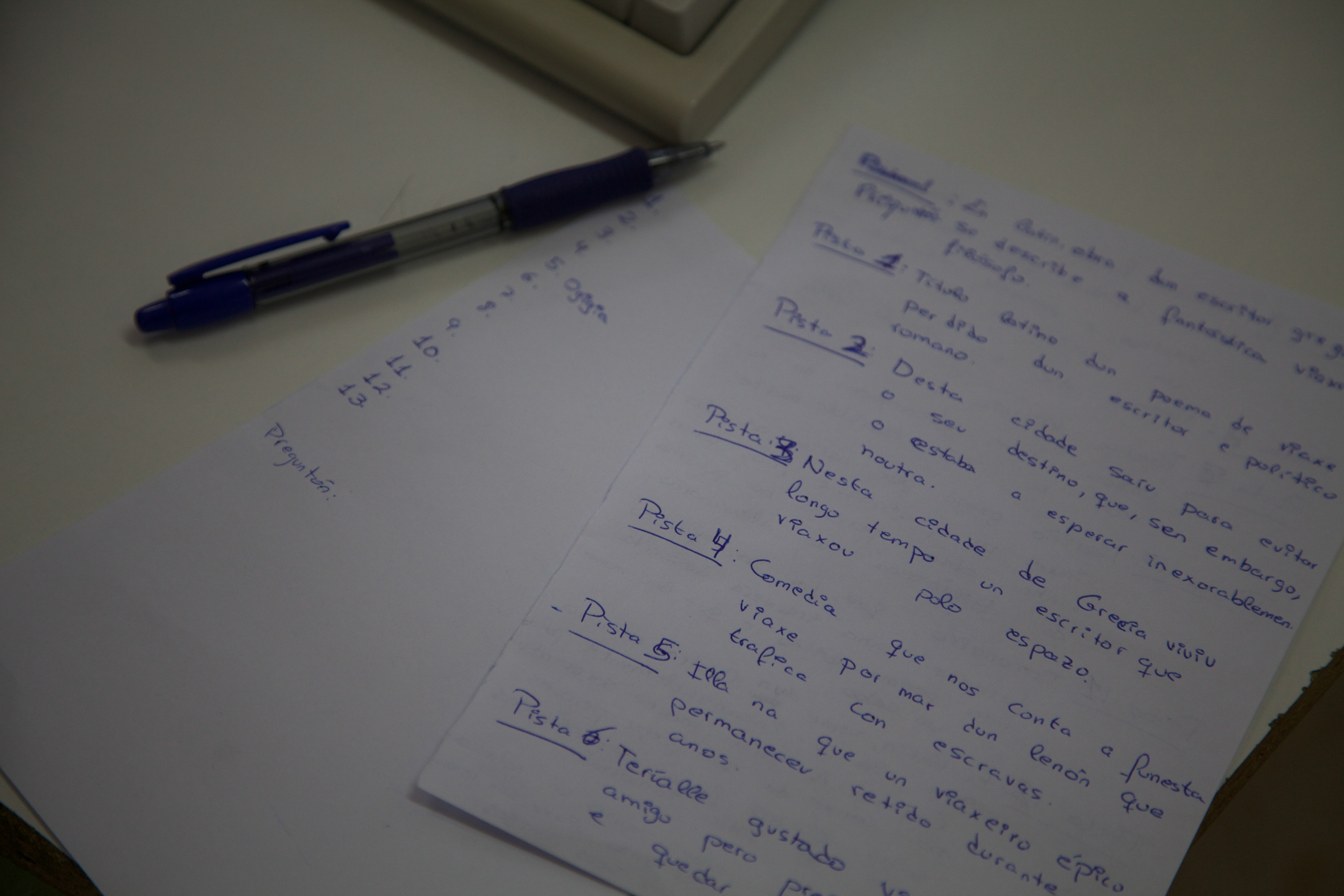 Concurso de Cultura Clásica Odisea. Foto tirada na Biblioteca do IES "Manuel García Barros", A Estrada, Galiza